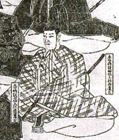 上杉治広の肖像。